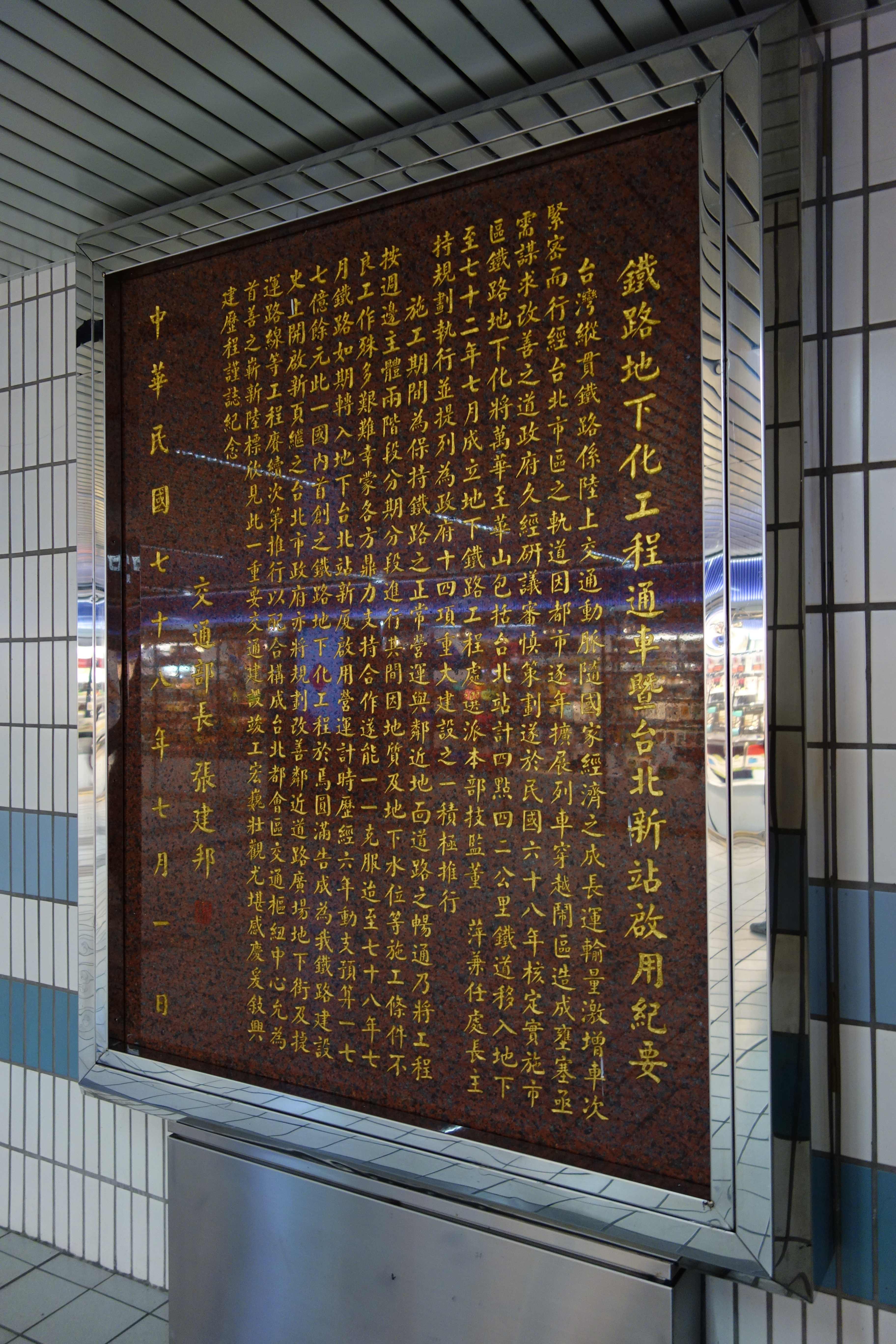 中文（台灣）: 〈鐵路地下化工程通車暨台北新站啟用紀要〉，刻於台北車站地下一樓，1989年7月1日中華民國交通部部長張建邦撰。